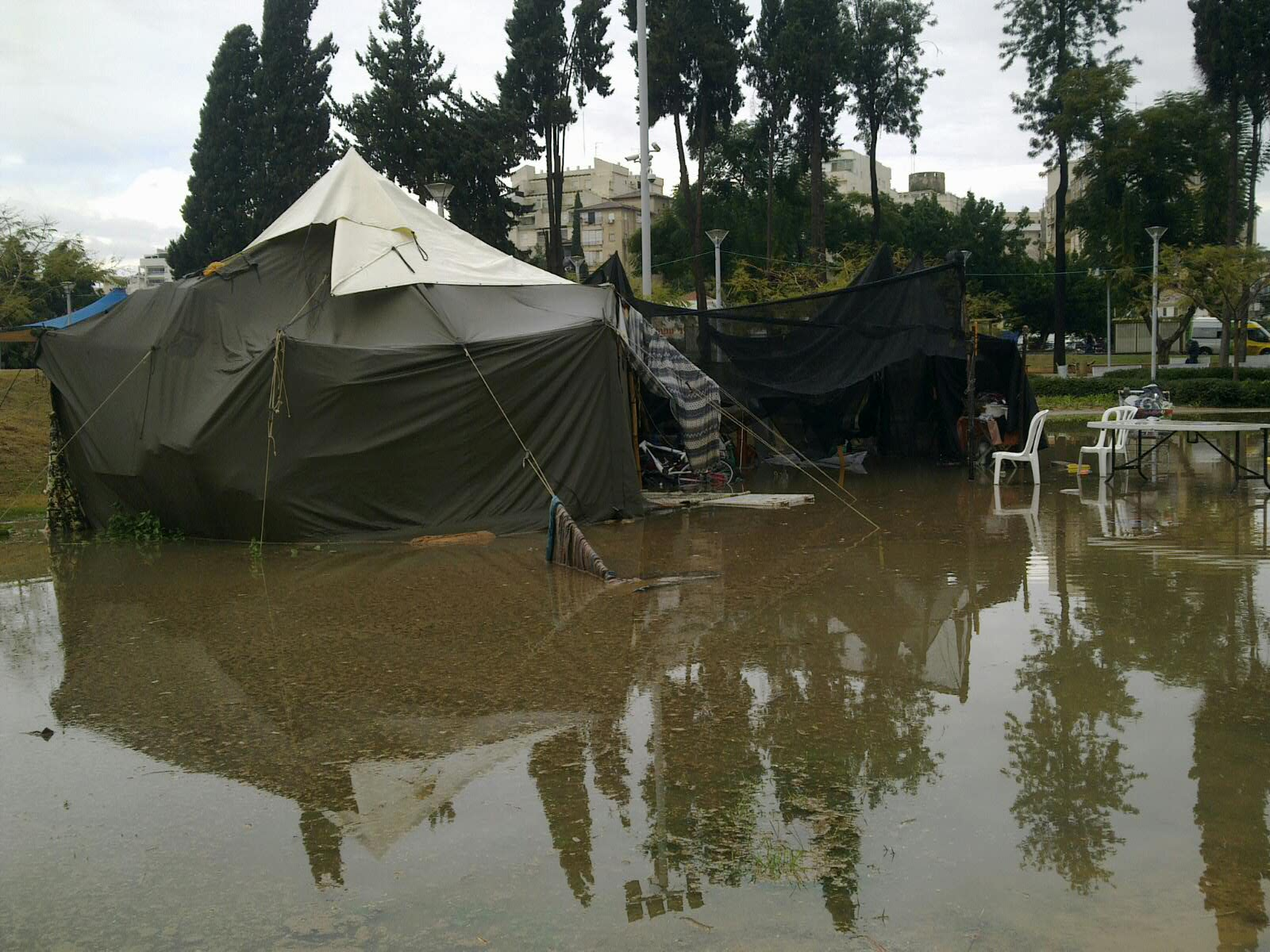 מאהל חסרי דיור, רחובות, 1 בפברואר 2012